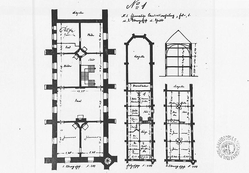 Grundrisse des ehemaligen Benediktiner-Klosters in Cismar